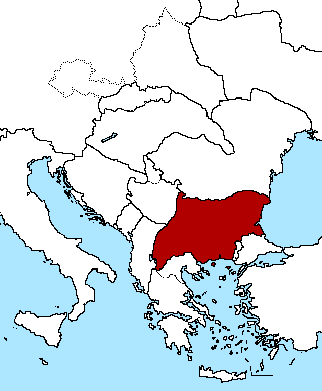 Location map, Bulgaria, 1942